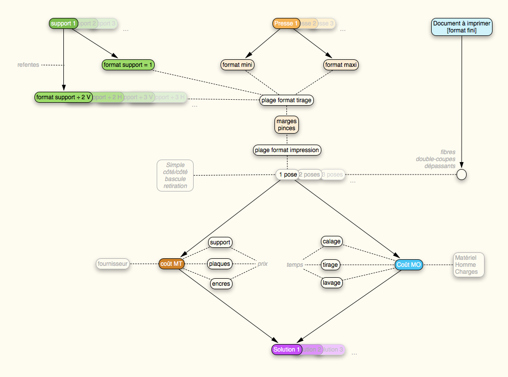 processus de l'imposition : sélectionner le bon format du support sélectionner la presse adaptée combiner les différentes possibilités pour obtenir la solution idéale (rentable et technique) MO=Main d'œuvre MT=Matière